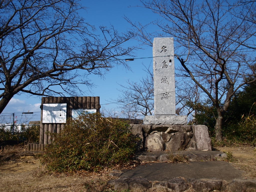 名島城址